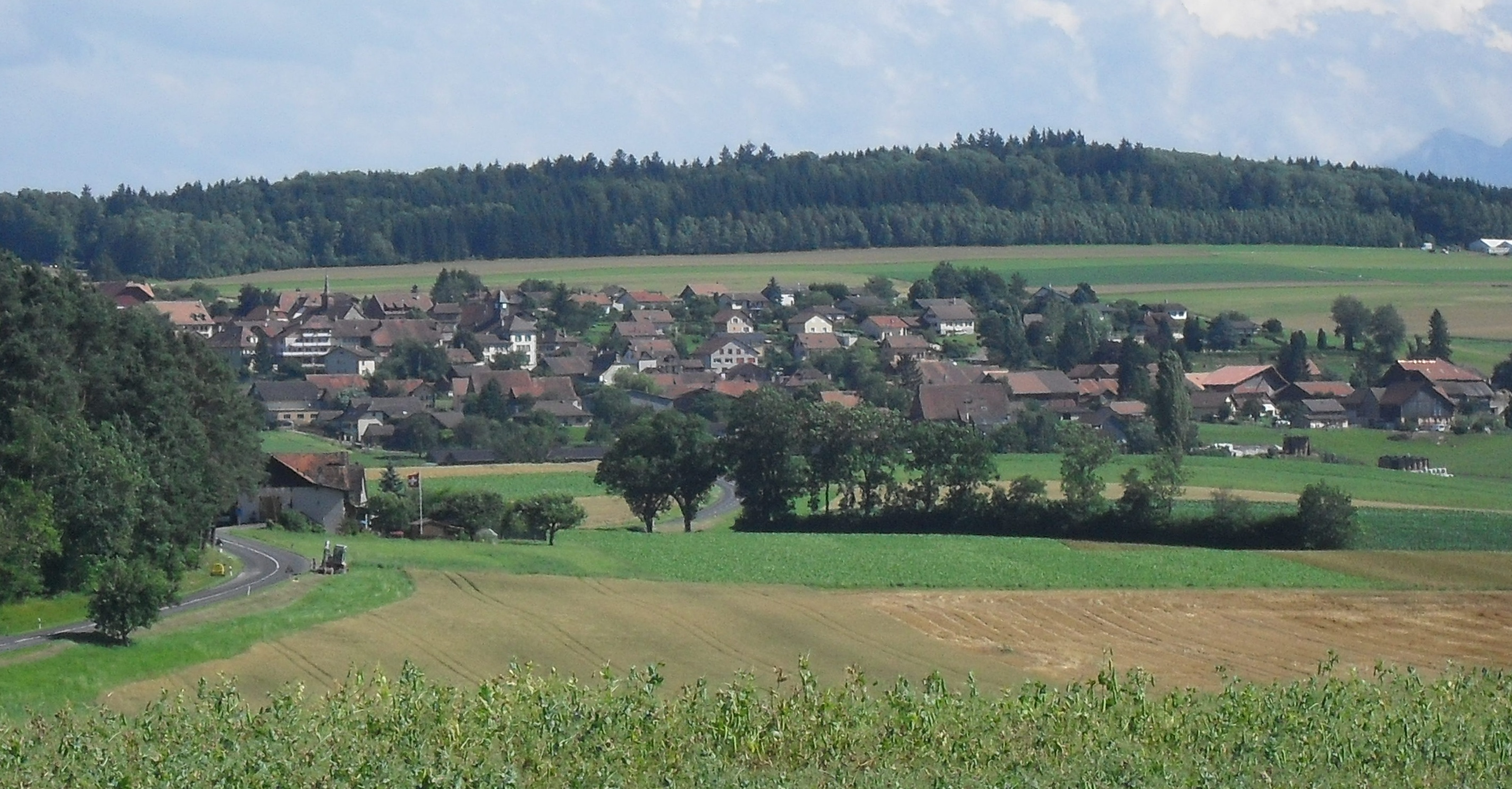 Vue de Thierrens